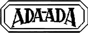 Logo der Firma Höchster Kinderschuh GmbH ADA-ADA, später ADA-ADA-Schuh AG